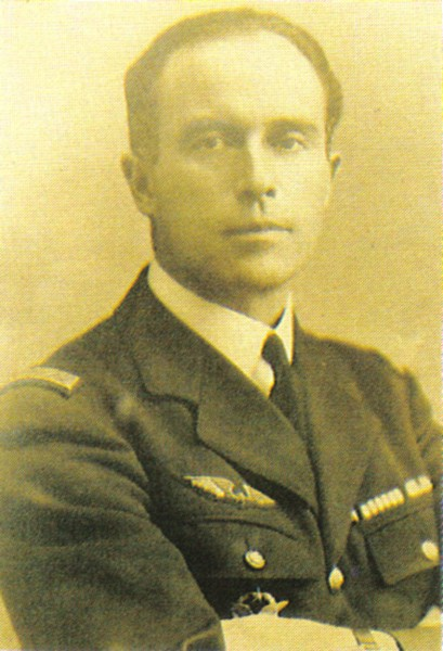 vue de jean d'aulan issu du site La vie rémoise.